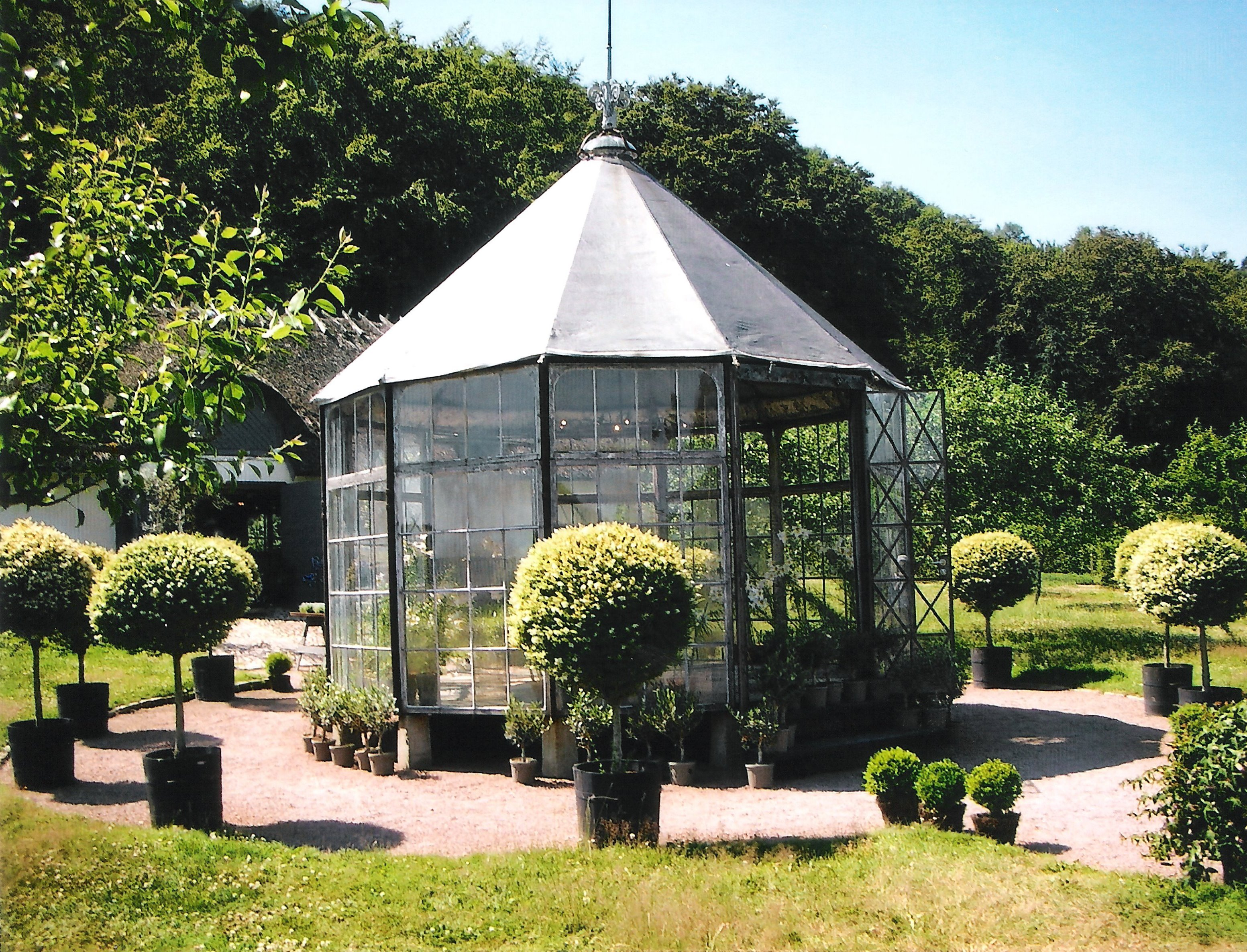 Norrvikens trädgårdar.